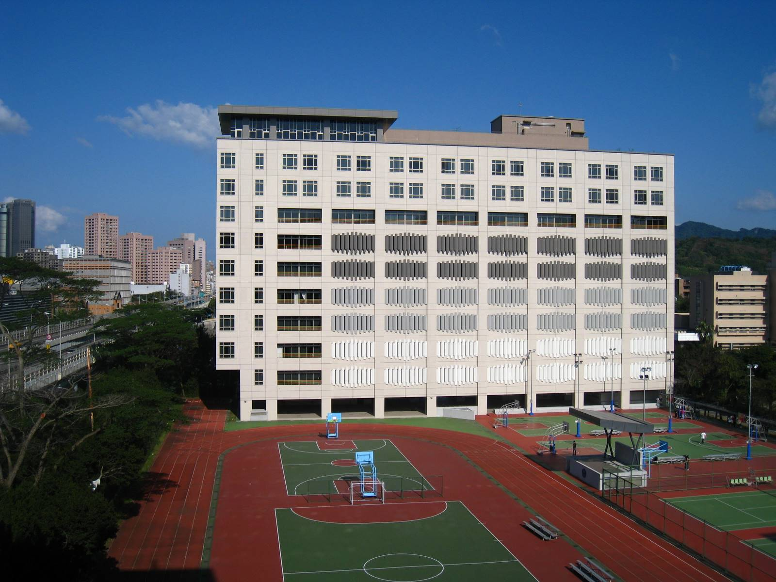 中文（台灣）: 國立臺灣科技大學研揚大樓實景。